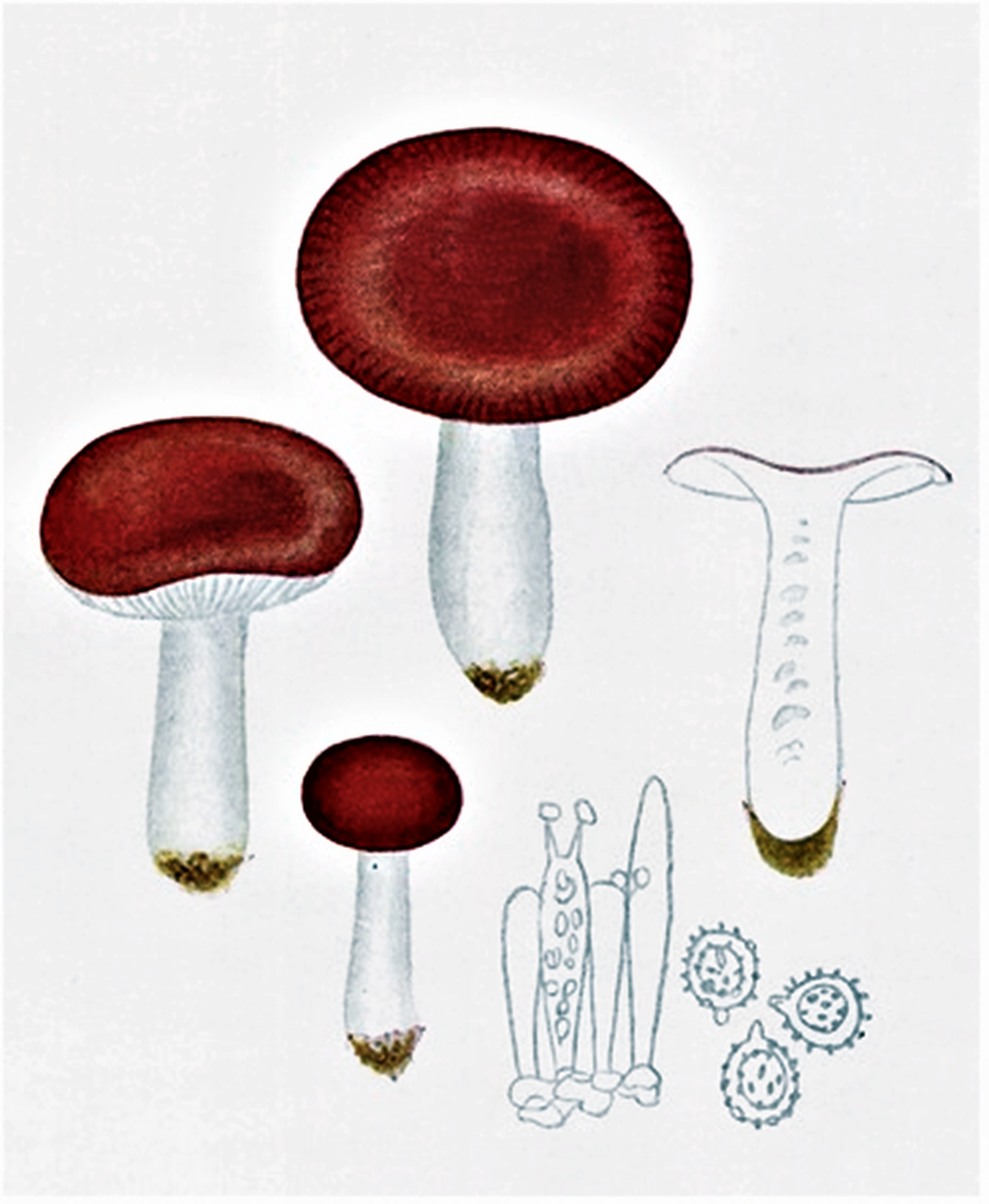 Giacomo Bresadola: Russula fragilis (Pers., 1801) Fr. (1838)